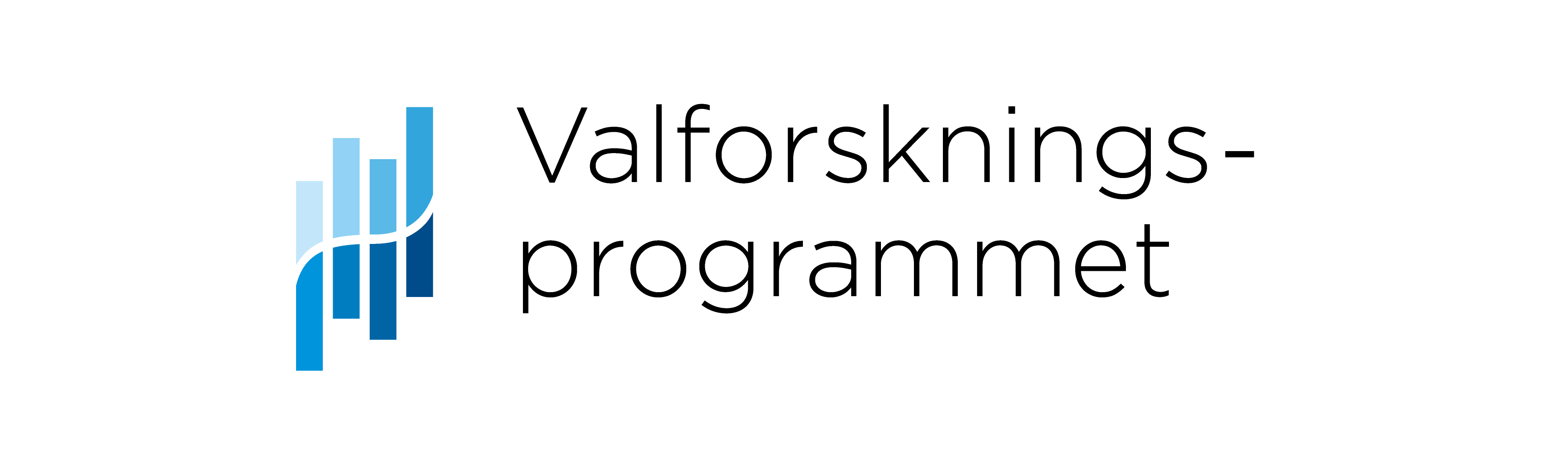 Valforskningsprogrammets logotyp